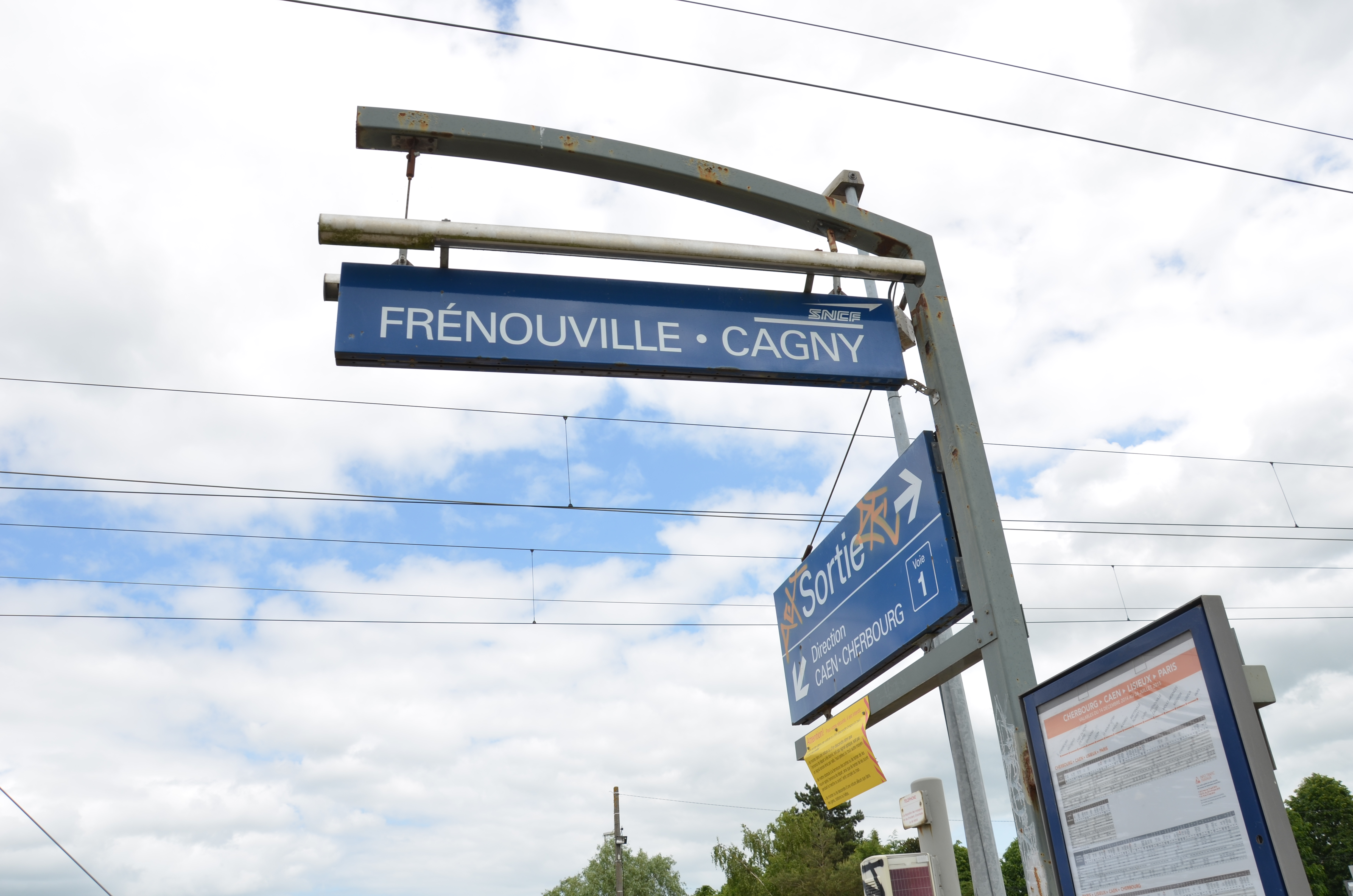 Panneau d'entrée en gare de Frénouville-Cagny, côté Cagny.